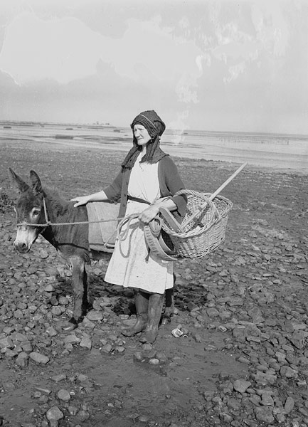 Teitl Cymraeg/Welsh title: Merched yn casglu cocos ym Mhen-clawdd, Morgannwg Ffotograffydd/Photographer: Geoff Charles (1909-2002) Dyddiad/Date: August 10, 1951. Cyfrwng/Medium: Negydd ffilm / Film negative Cyfeiriad/Reference: (gch12121) Rhif cofnod / Record no.: 3369677 Rhagor o wybodaeth am gasgliad Geoff Charles yn Llyfrgell Genedlaethol Cymru More information about the Geoff Charles Collection at the National Library of Wales Mae ffotograffau Geoff Charles hefyd yn rhan o Broject Europeana Libraries Geoff Charles' photographs also form part of the Europeana Libraries Project